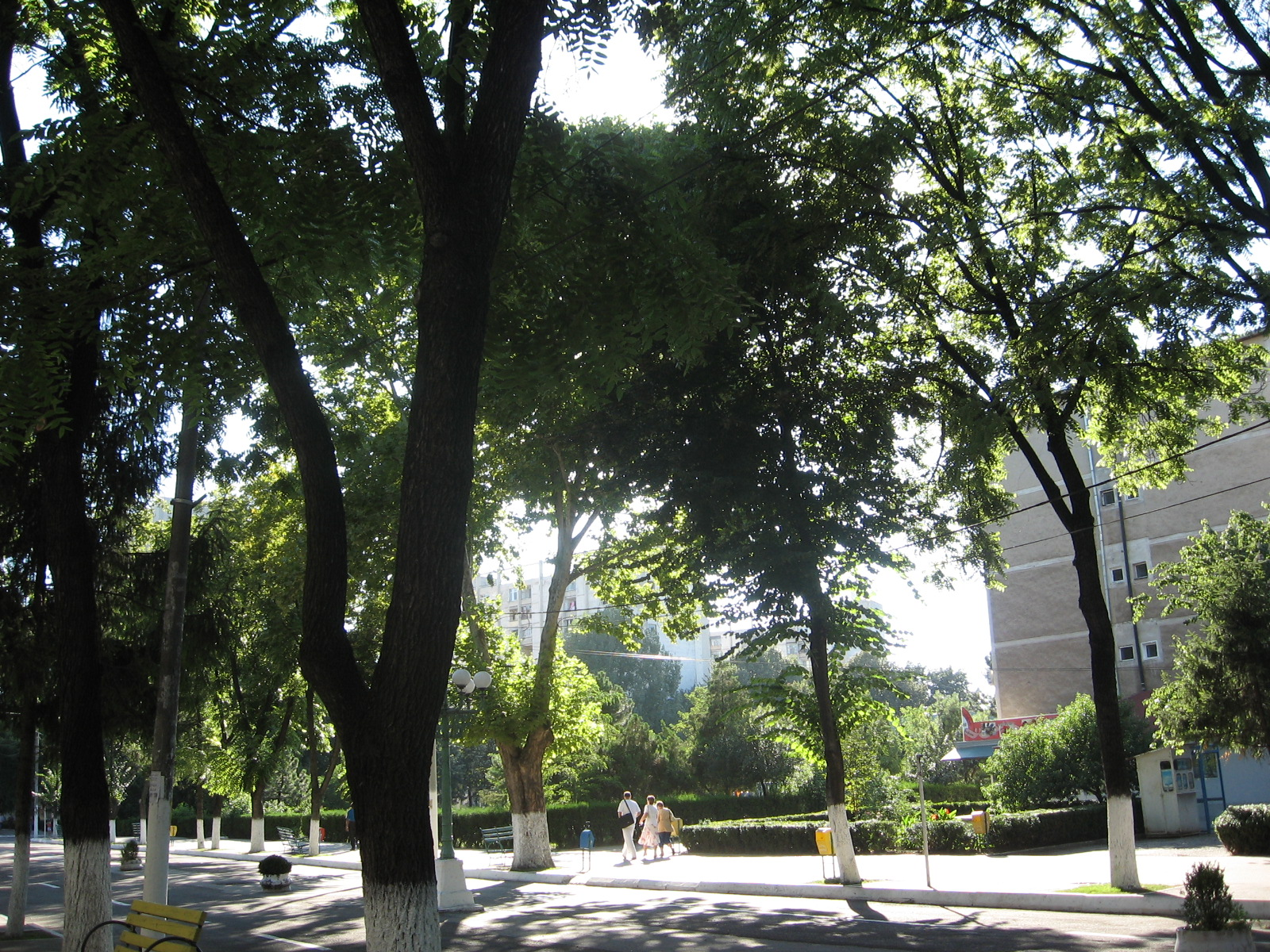 Street in Turnu Magurele, Romania